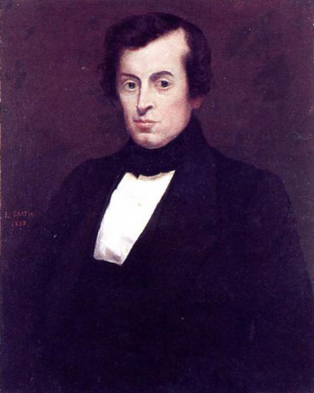 Frederic Chopin